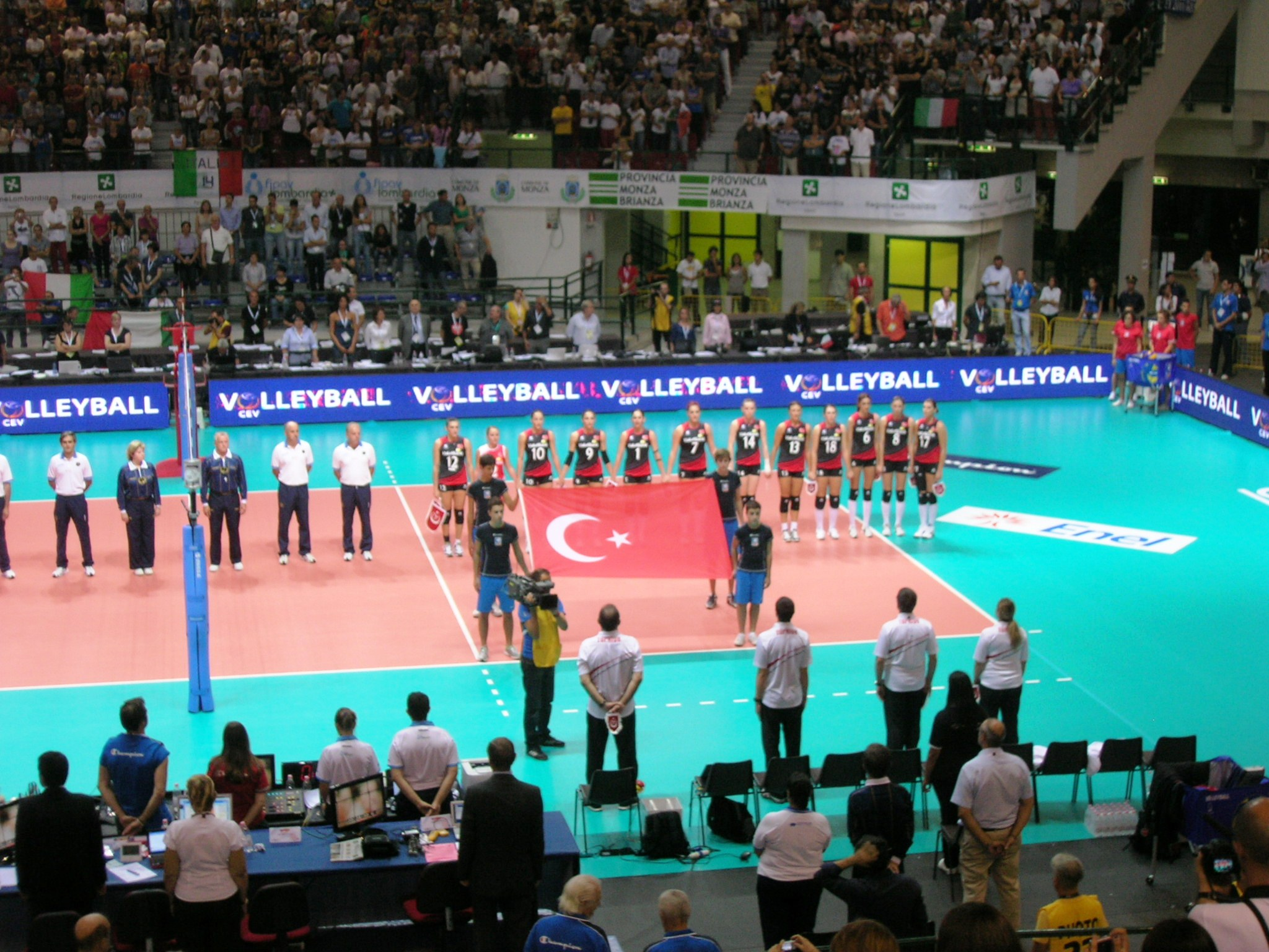 Partita: Italia - Turchia 2-3